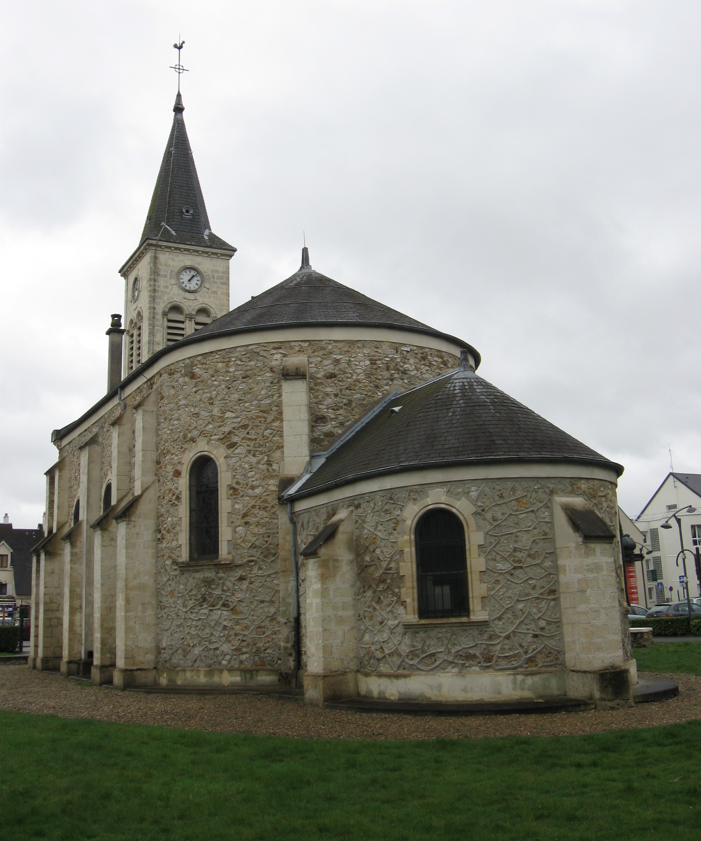 Église Saint-éloi d'Émerainville. (Seine-et-Marne, région Île-de-France).